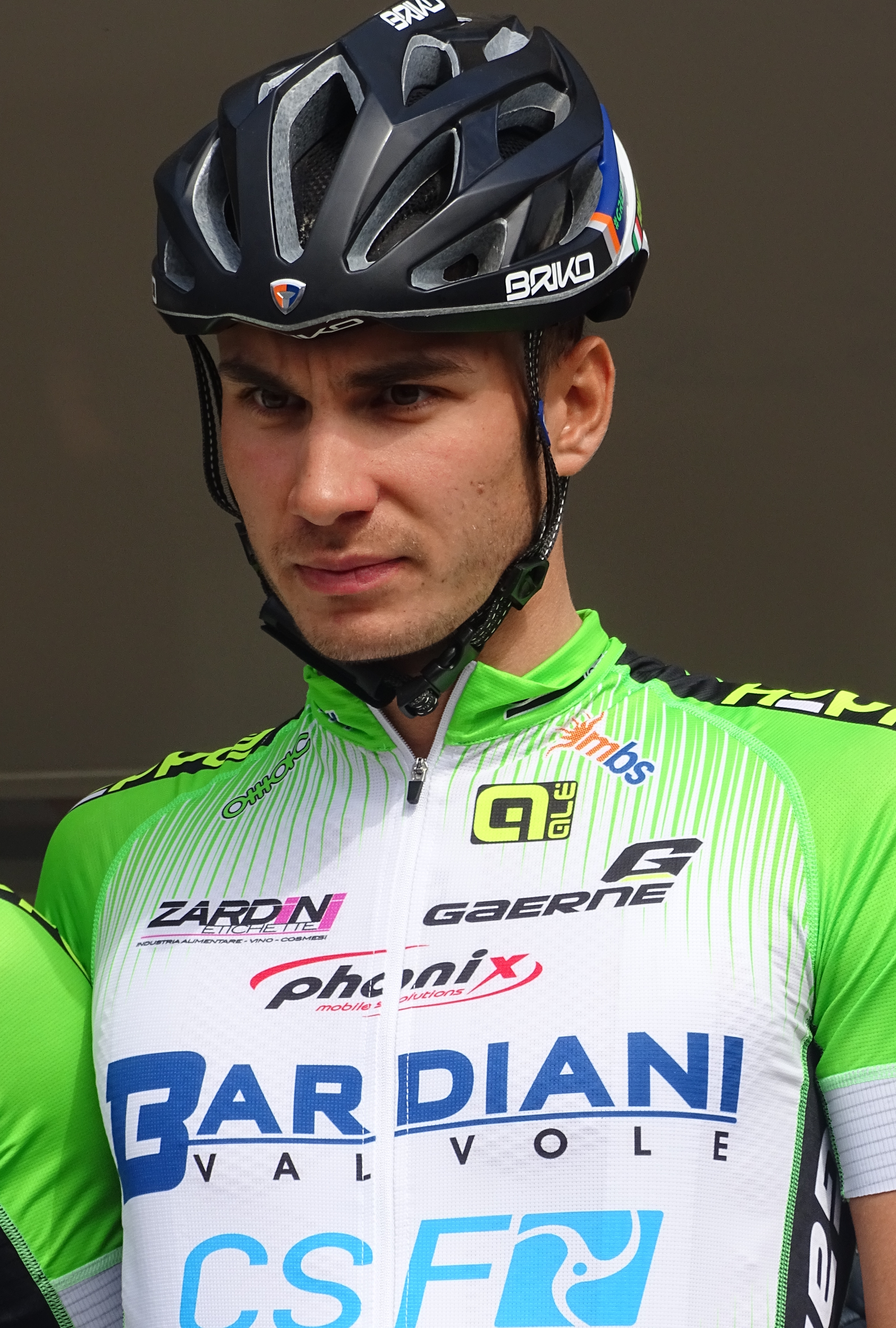 Reportage réalisé le jeudi 16 avril à l'occasion du départ et de l'arrivée du Grand Prix de Denain 2015 à Denain, Nord, Nord-Pas-de-Calais, France.